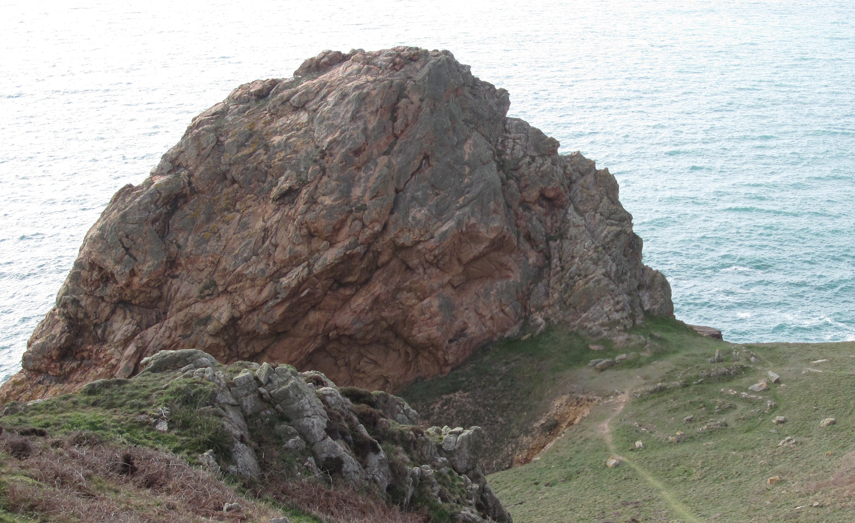 Nrf: Lé Pinnacl'ye, Jèrri